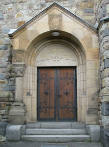 Peterskirche in Weinheim